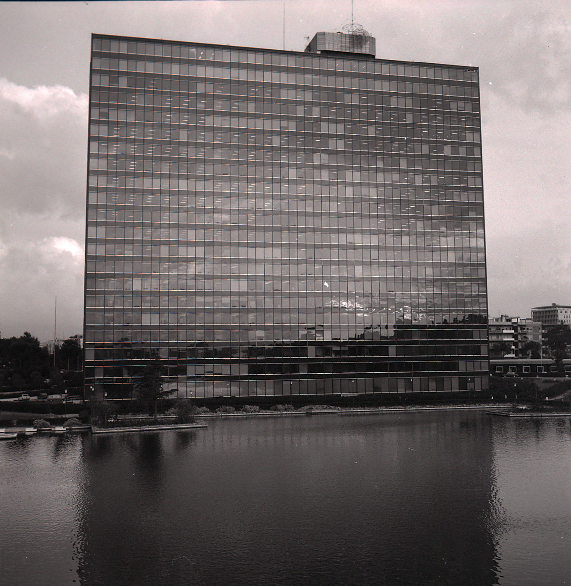 Servizio fotografico : Roma, 1967 / Paolo Monti. - Buste: 1, Fototipi: 30 : Negativo b/n, gelatina bromuro d'argento/ pellicola ; 6x6. - ((Serie costituita da 30 negativi identificati con la numerazione: 22629-22658. Sulla busta R22629 manoscritto: "EUR/ Roma". La suddetta serie è contenuta nella scatola identificata con la numerazione R22440/22745. Sul coperchio iscrizione manoscritta a pennarello: "Località varie". - Fonte: Agenda di Paolo Monti: Monti/ 3 aprile 1966 - 9 marzo 1971/ 12421-16823 (1966-1971), presso Archivio Paolo Monti